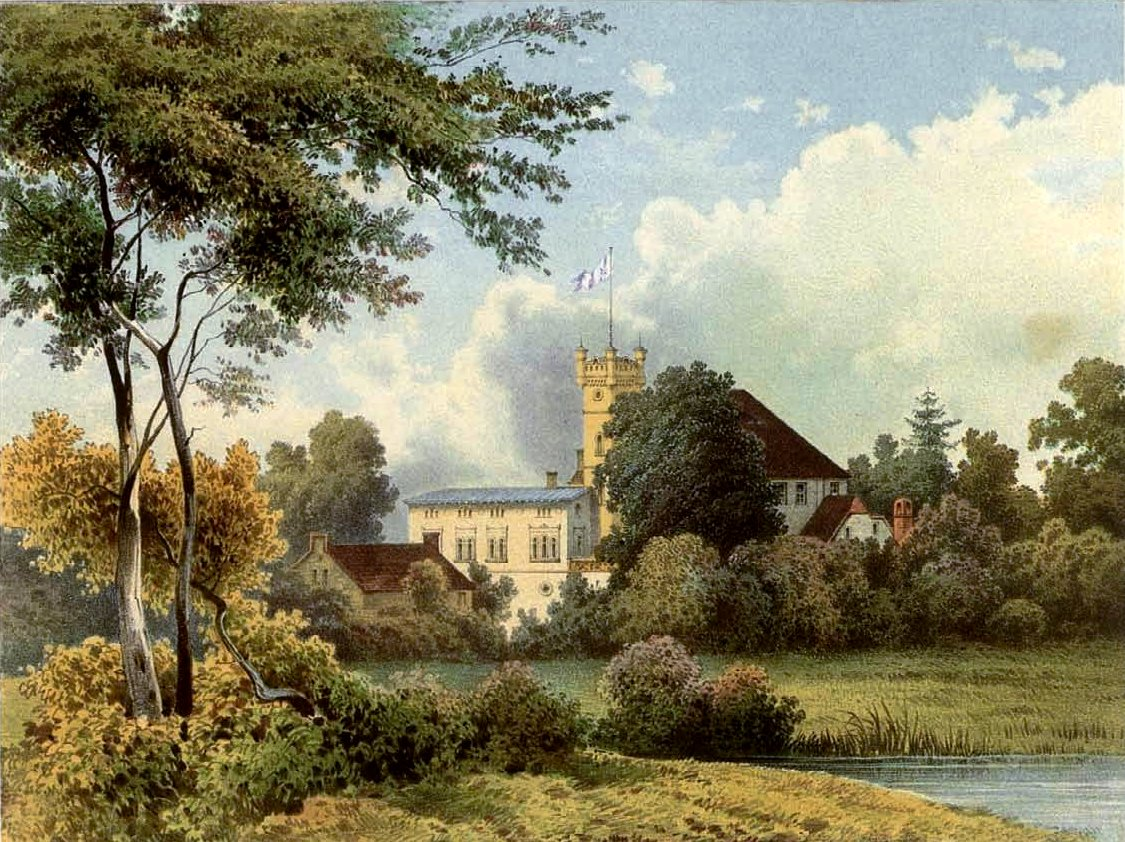 Schloss Drebkau, Kreis Calau